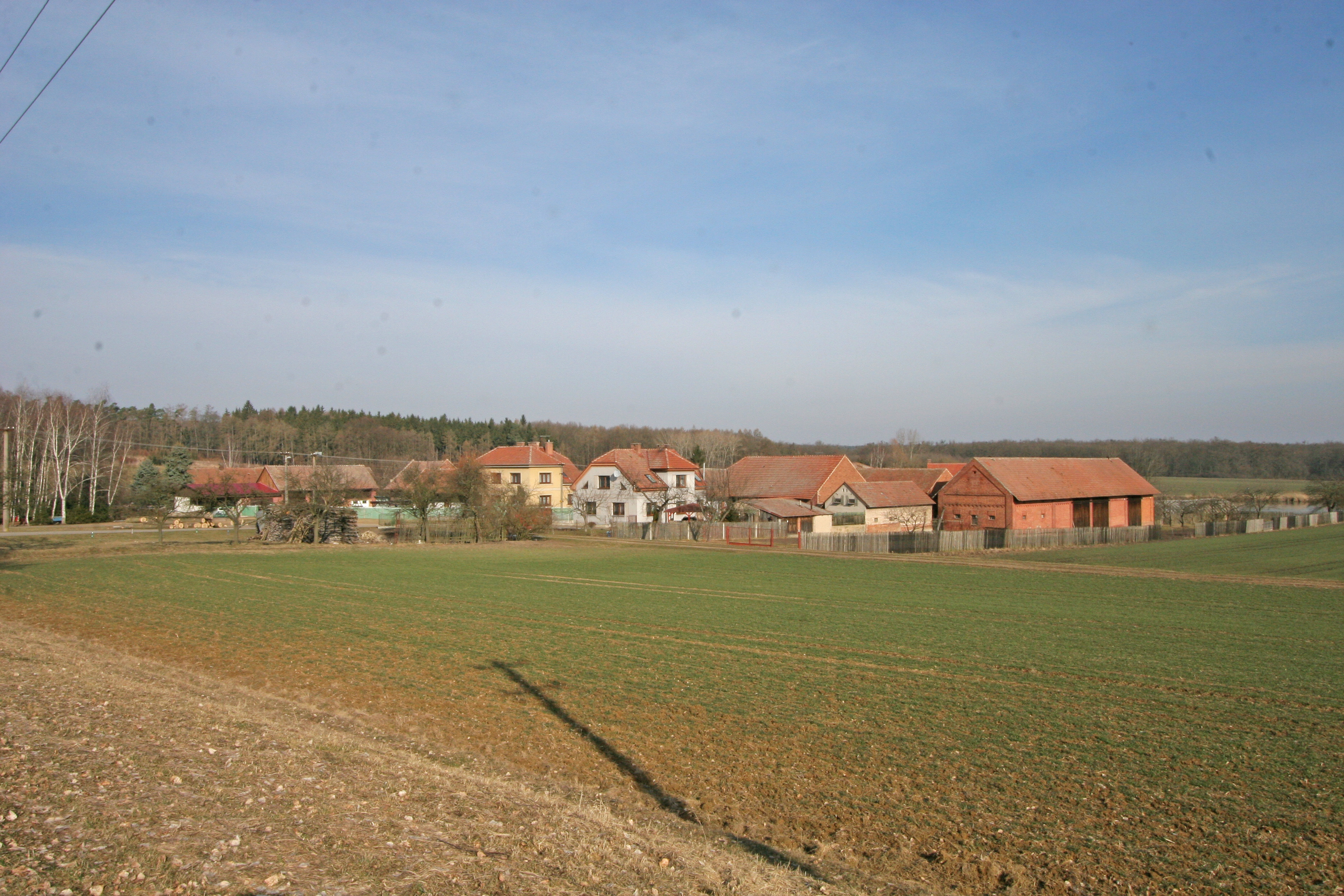 Budín